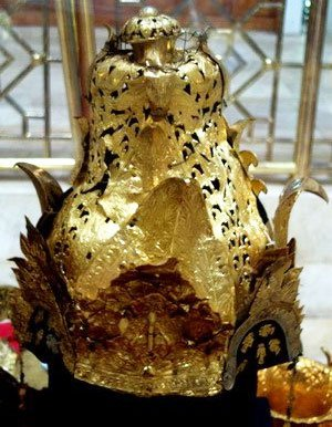 Makuta Binokasih di musieum Prabu Geusan Ulun anu aya pas di gigireun / sabeulahna Pandopo Kabupatén Sumedang.